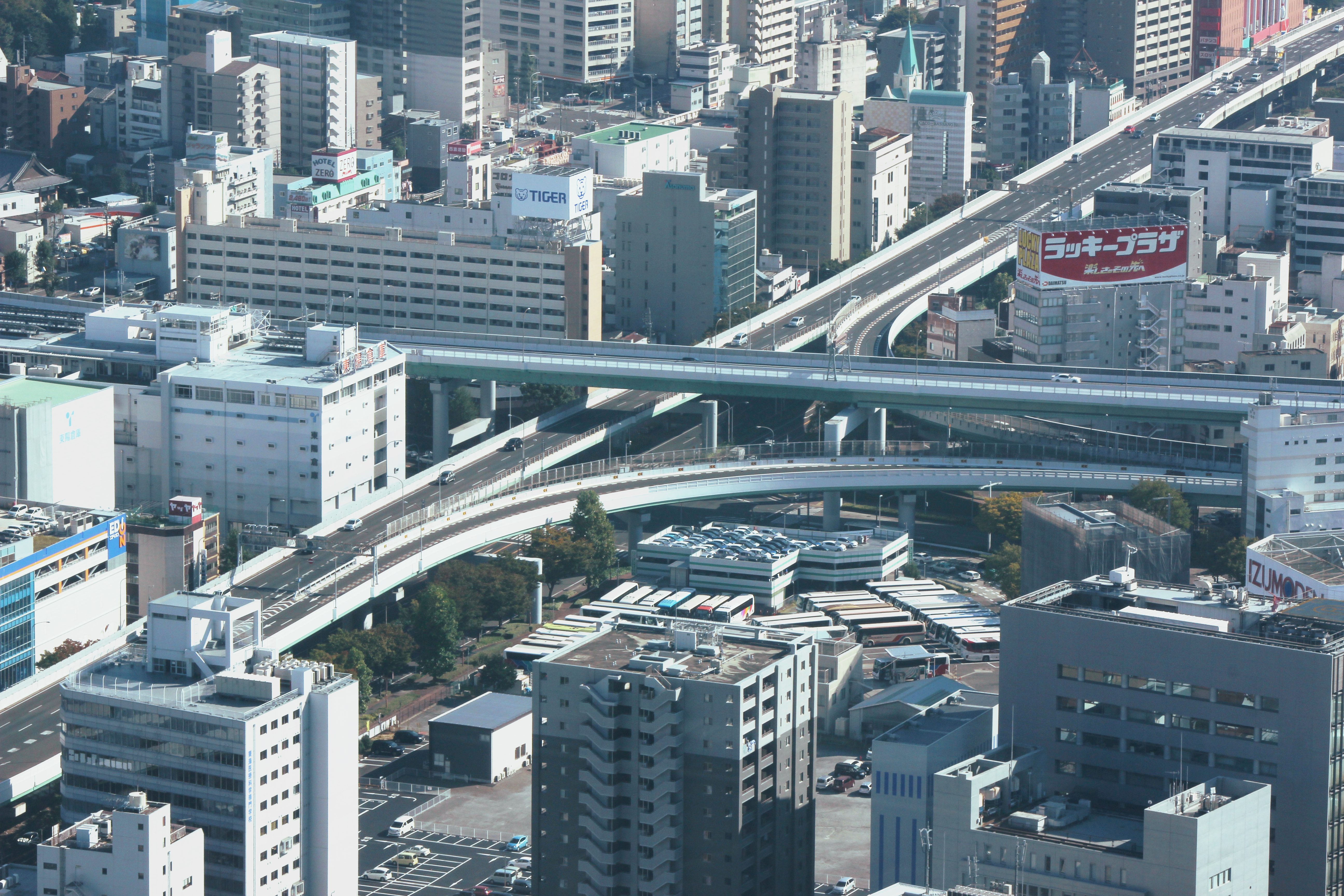 名古屋高速 新洲崎JCT（ミッドランドスクエアから撮影）